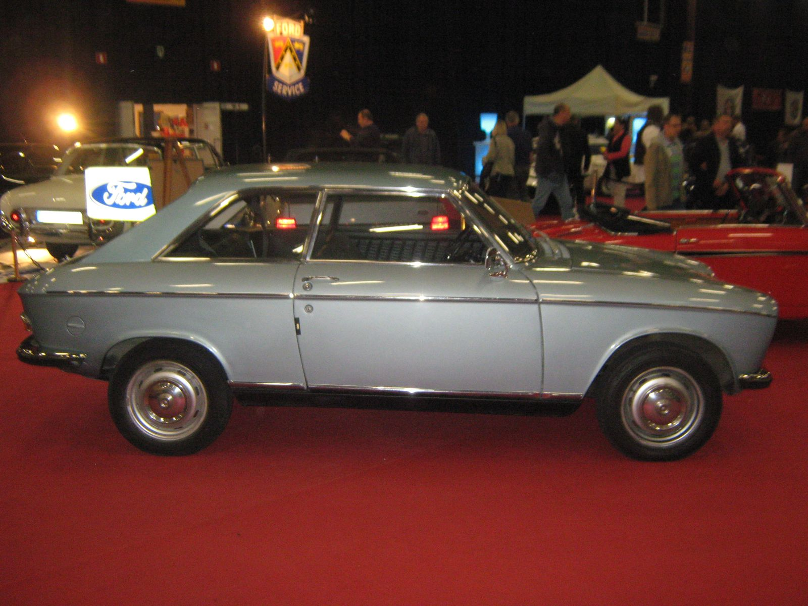 Peugeot 204 bei der Retromoteur 2011 in Ciney, Wallonie, Belgien.